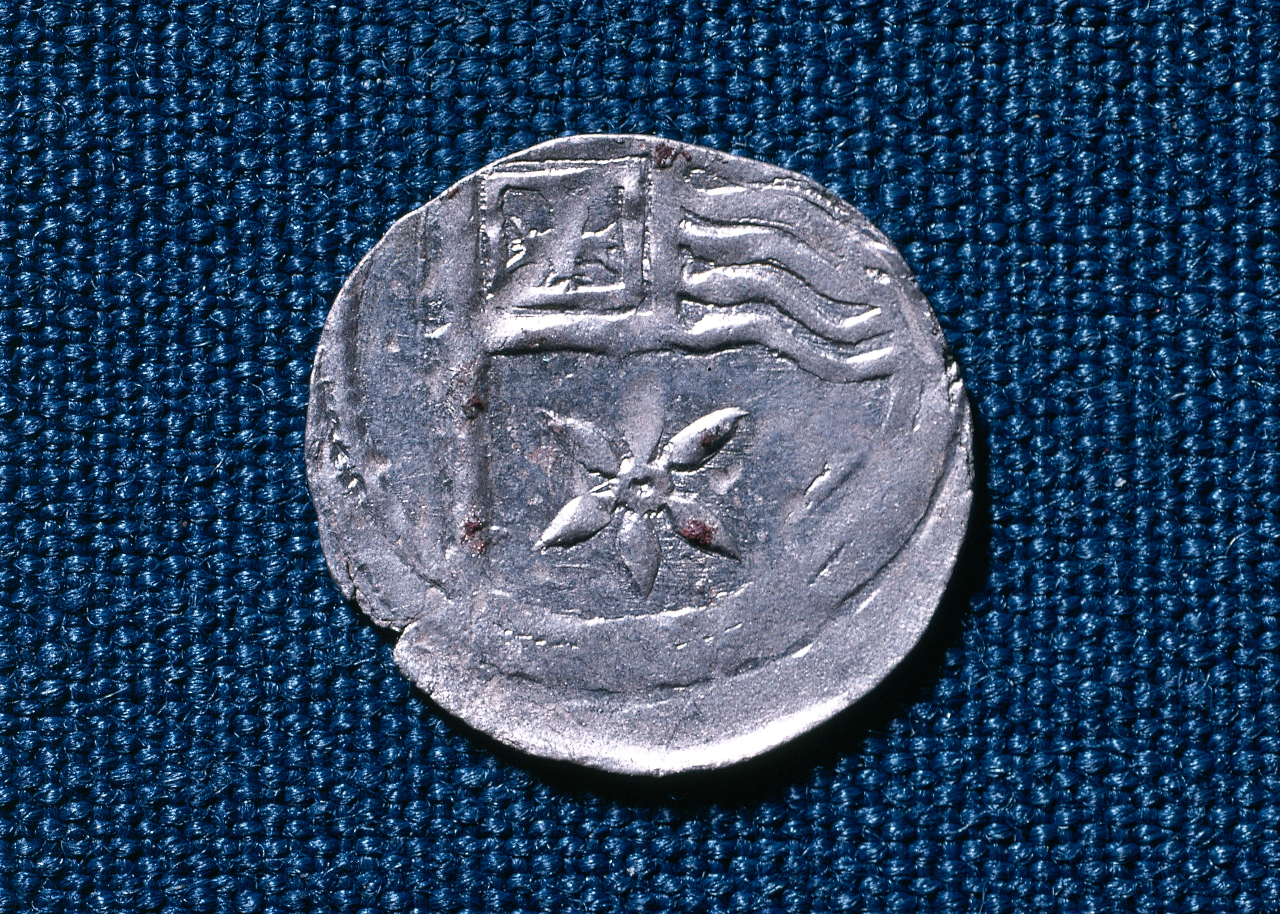 Bagside af dansk penning i sølv, kaldet "Dannebrogsmønt" på grund af motivet, slået i Slesvig under Valdemar den Store (1131-1182, konge fra 1154): Bemærkelsesværdigt nok tillægges brugen af Dannebrog traditionelt sønnen Valdemar Sejr (1170-1241) efter slaget ved Lyndanisse 15. juni 1219, men denne mønt viser at man allerede i 1100-tallet synes at have anvendt korsbanner, muligvis i relation til Jerusalem-korstogene. Af typen Hauberg 61.